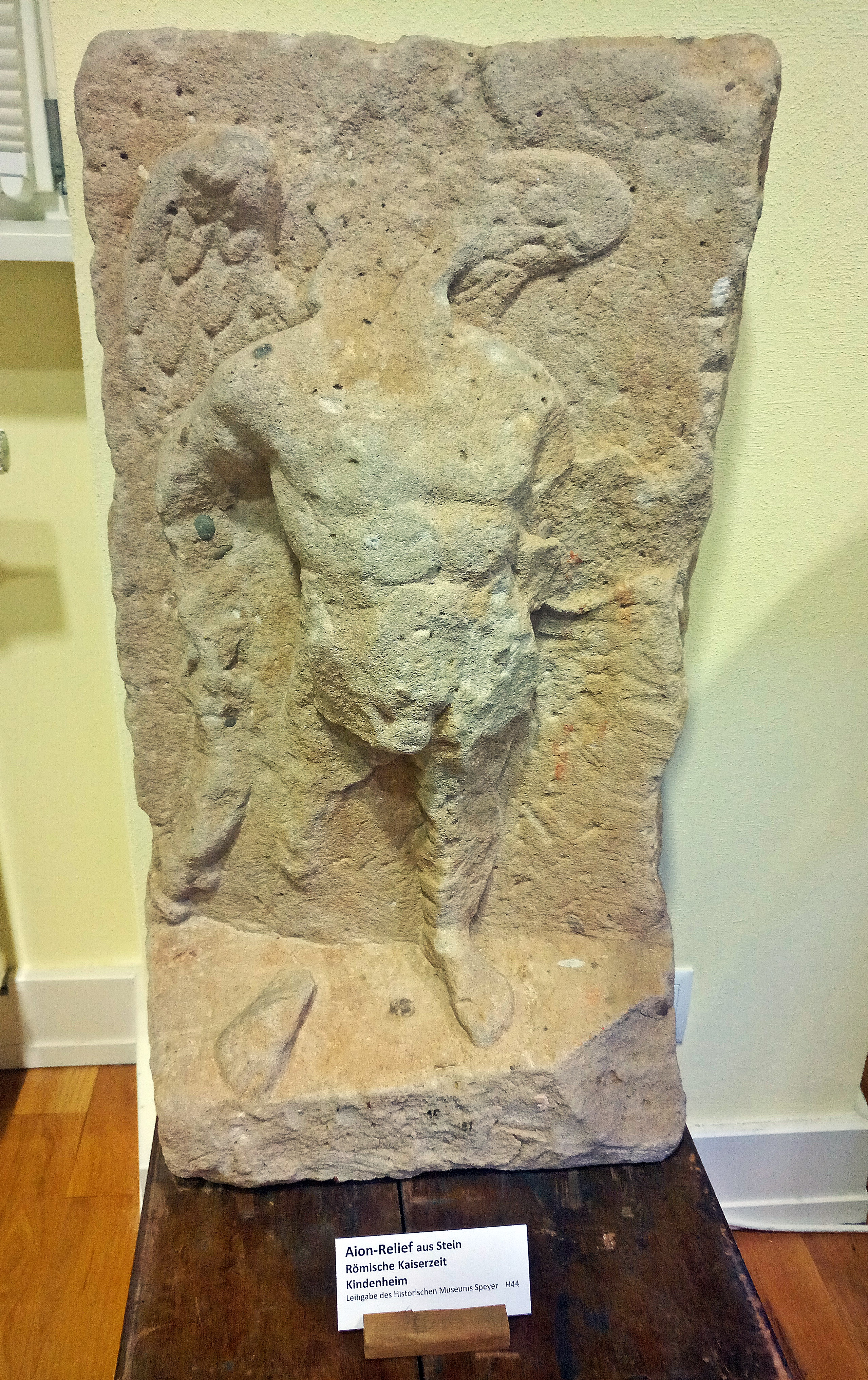 Römisches Aion-Relief aus Kindenheim, gefunden 1925, heute Historisches Museum der Pfalz, Speyer